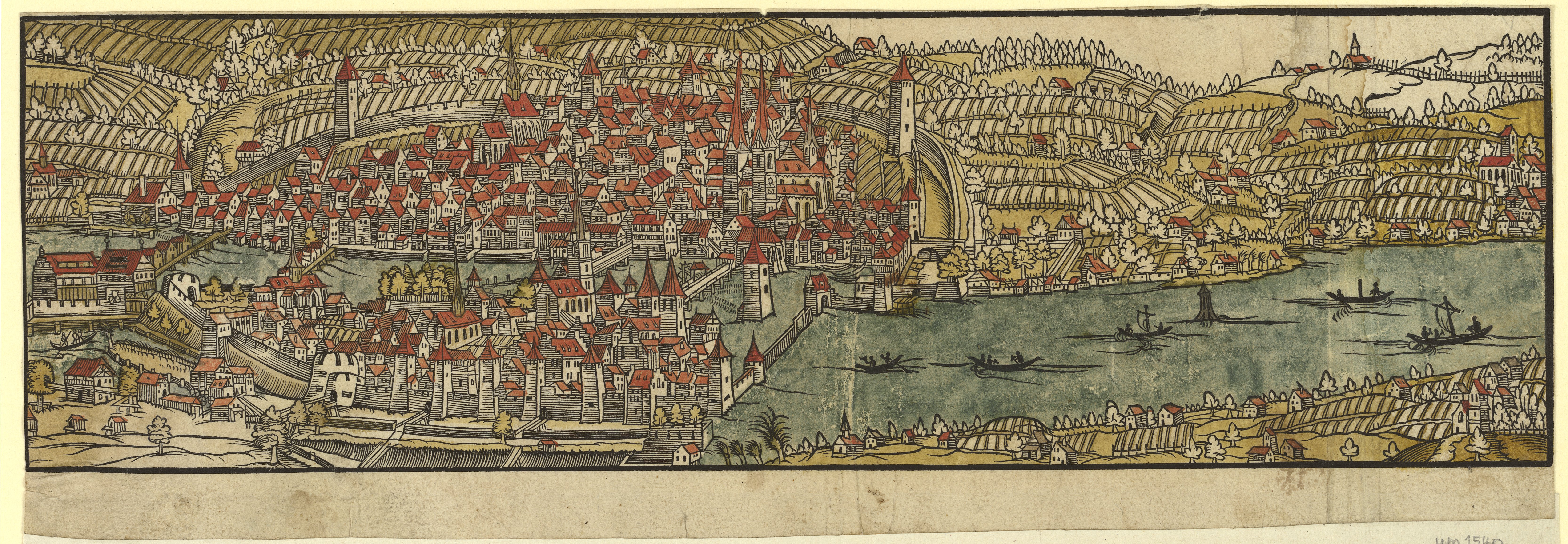 Karte von Zürich um 1540